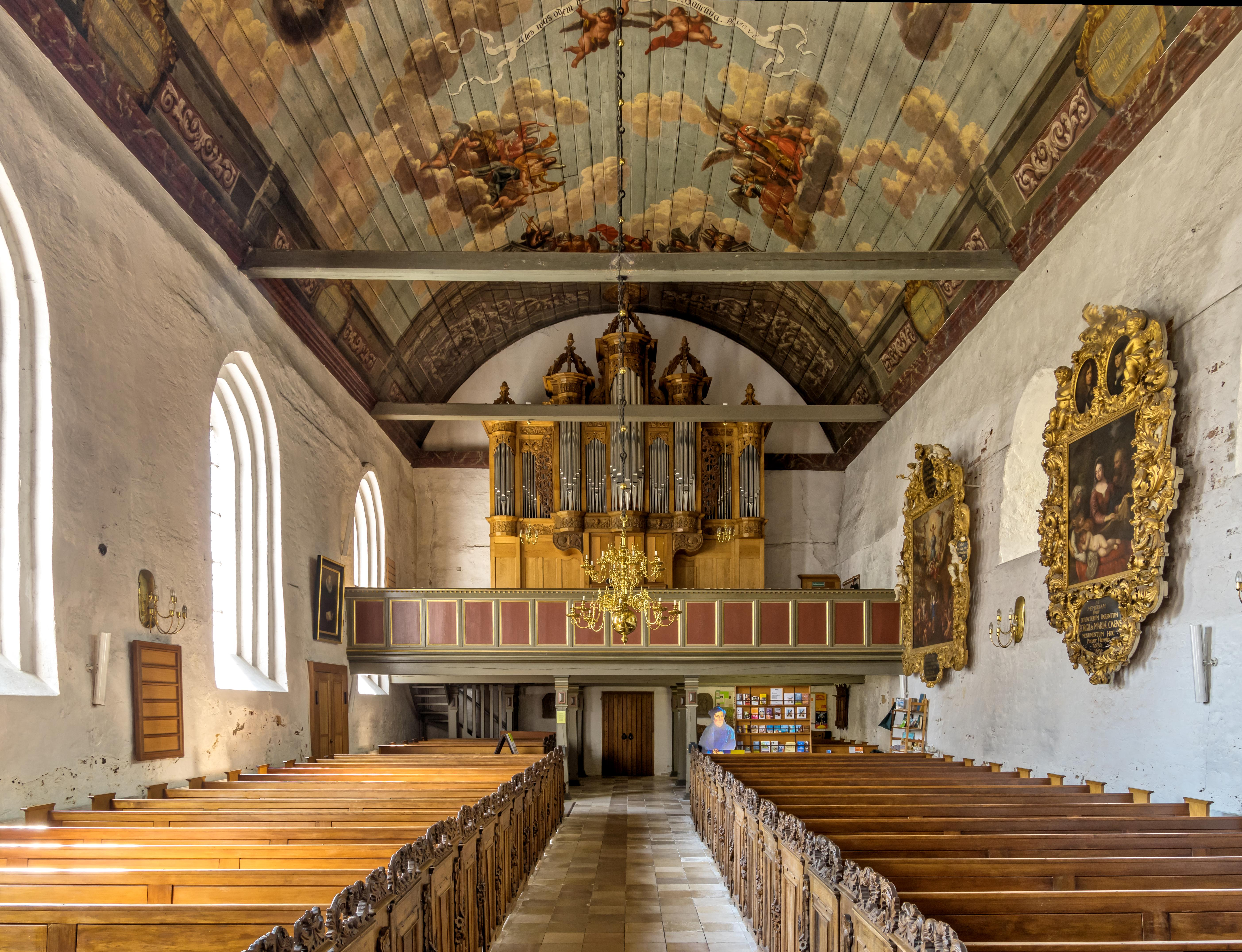 Bilder aus Tönning Die St. Laurentius Kirche in Tönning, Bilder von innen und außen